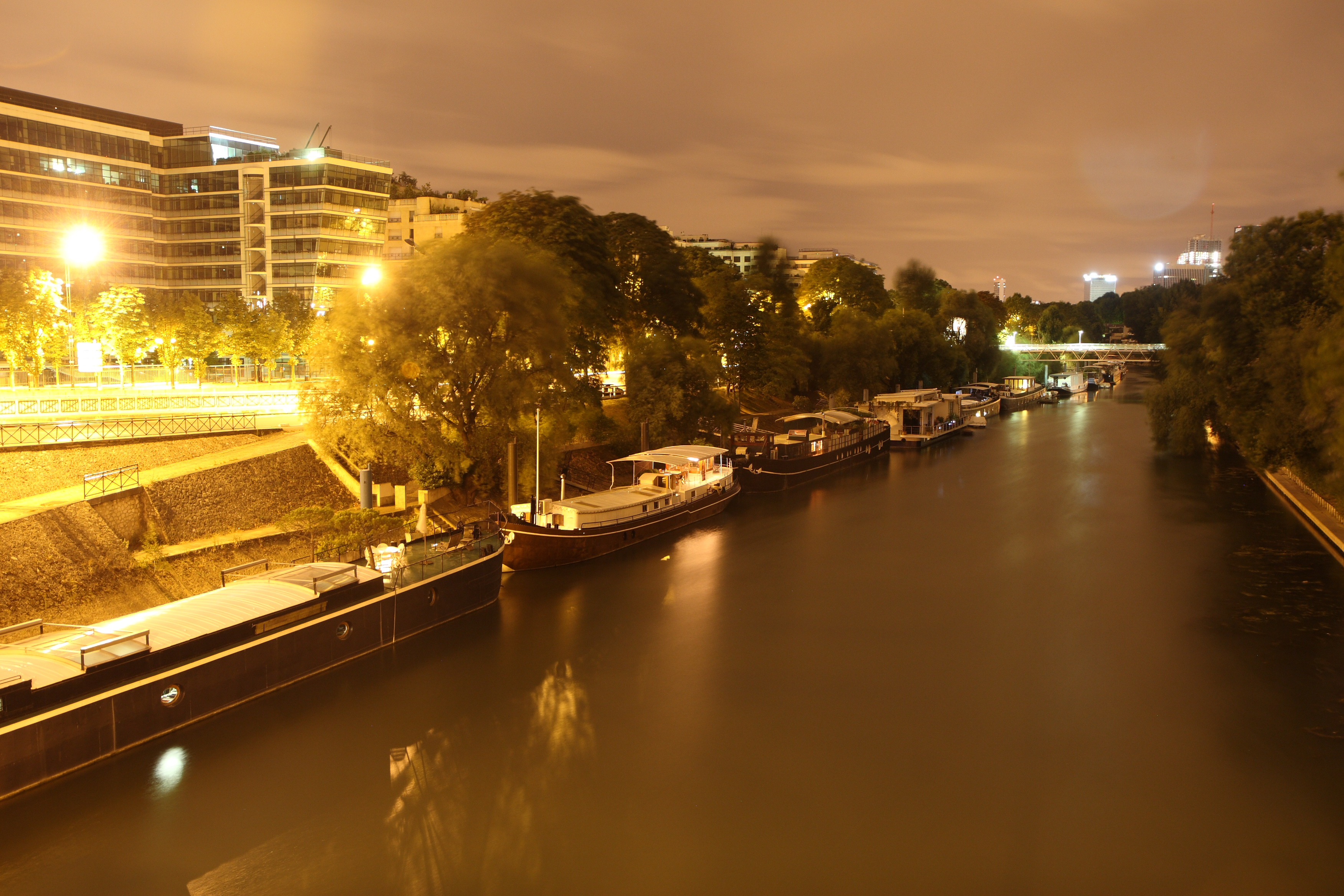 Île de la Jatte vue du Pont de Levallois, Levallois-Perret, France.